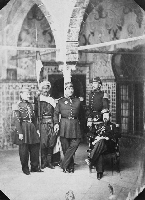 Le général Périgot et ses officiers, à Bône, 1856-1857